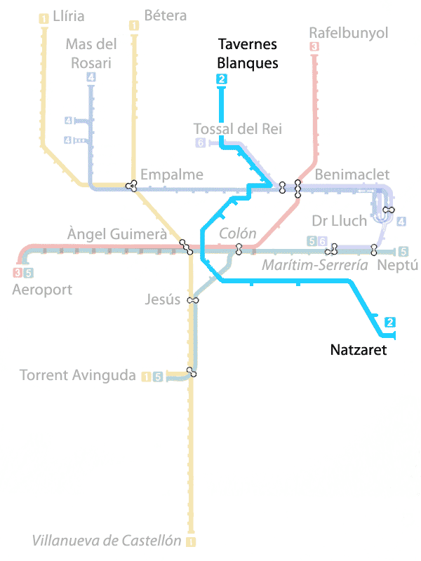 Línia 2 del metro de València. és una línia en construcció (2008). el traçat i nombre d'estacions no són exactes.